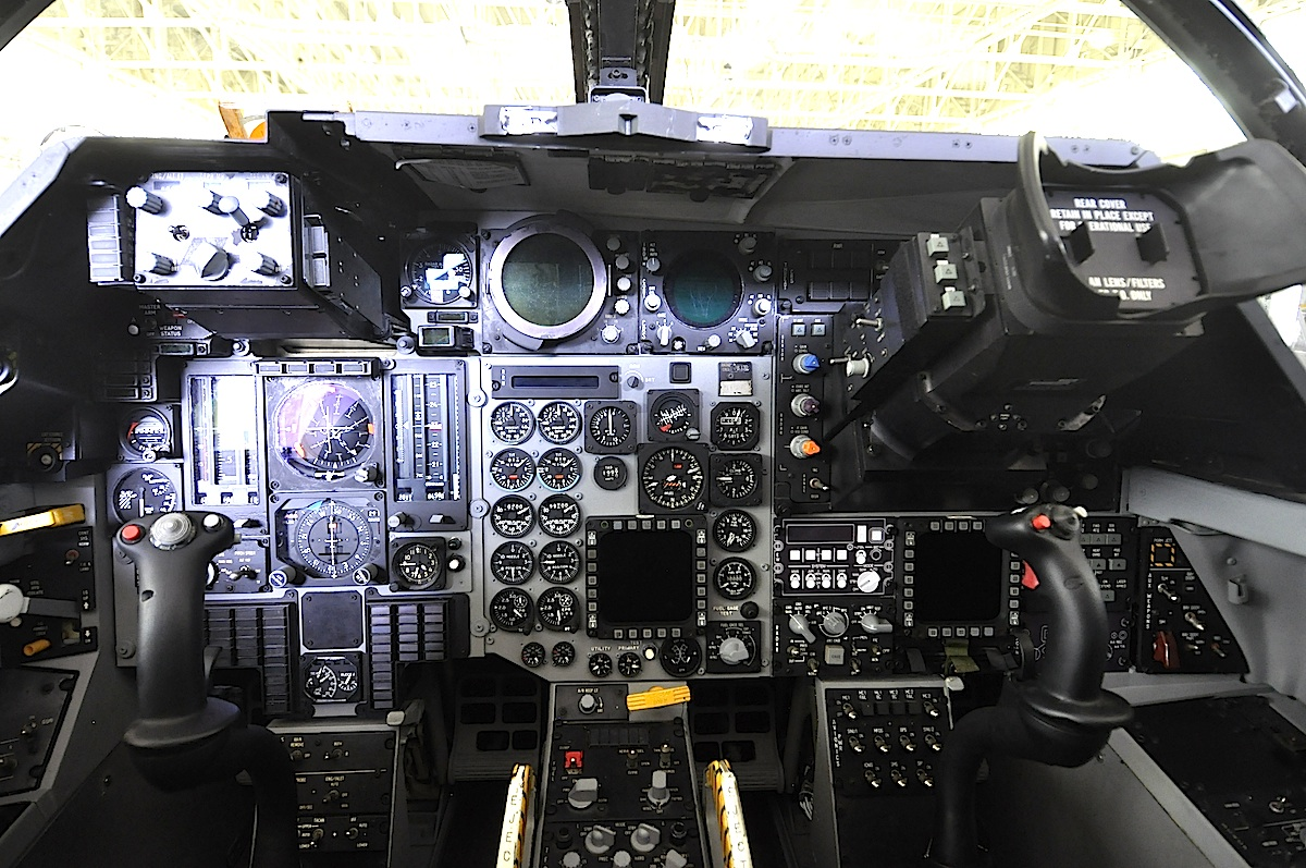 F-111 Arrival